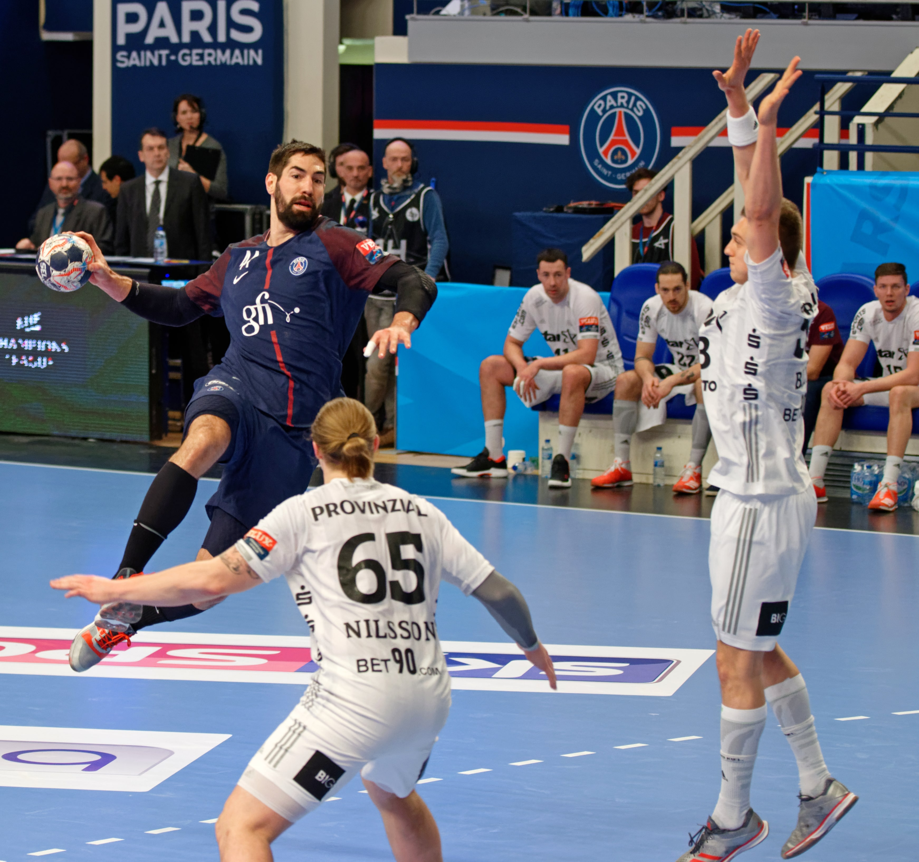 Match entre le PSG et Kiel. A Coubertin, le 04 mars 2018.